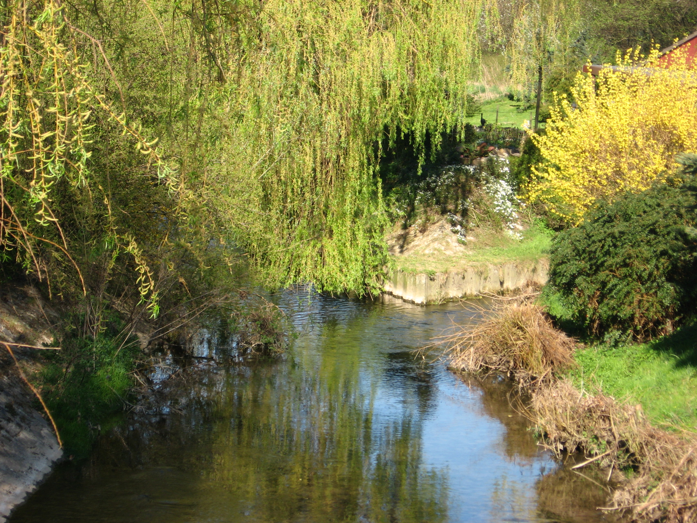 Zusammenfluss der Berlebecke (rechts) mit der Wiembecke